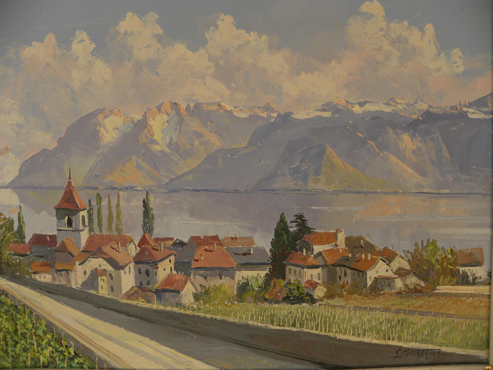 Peinture de Gaston-Robert Peitrequin (1915-1990). Le village représenté est Cully